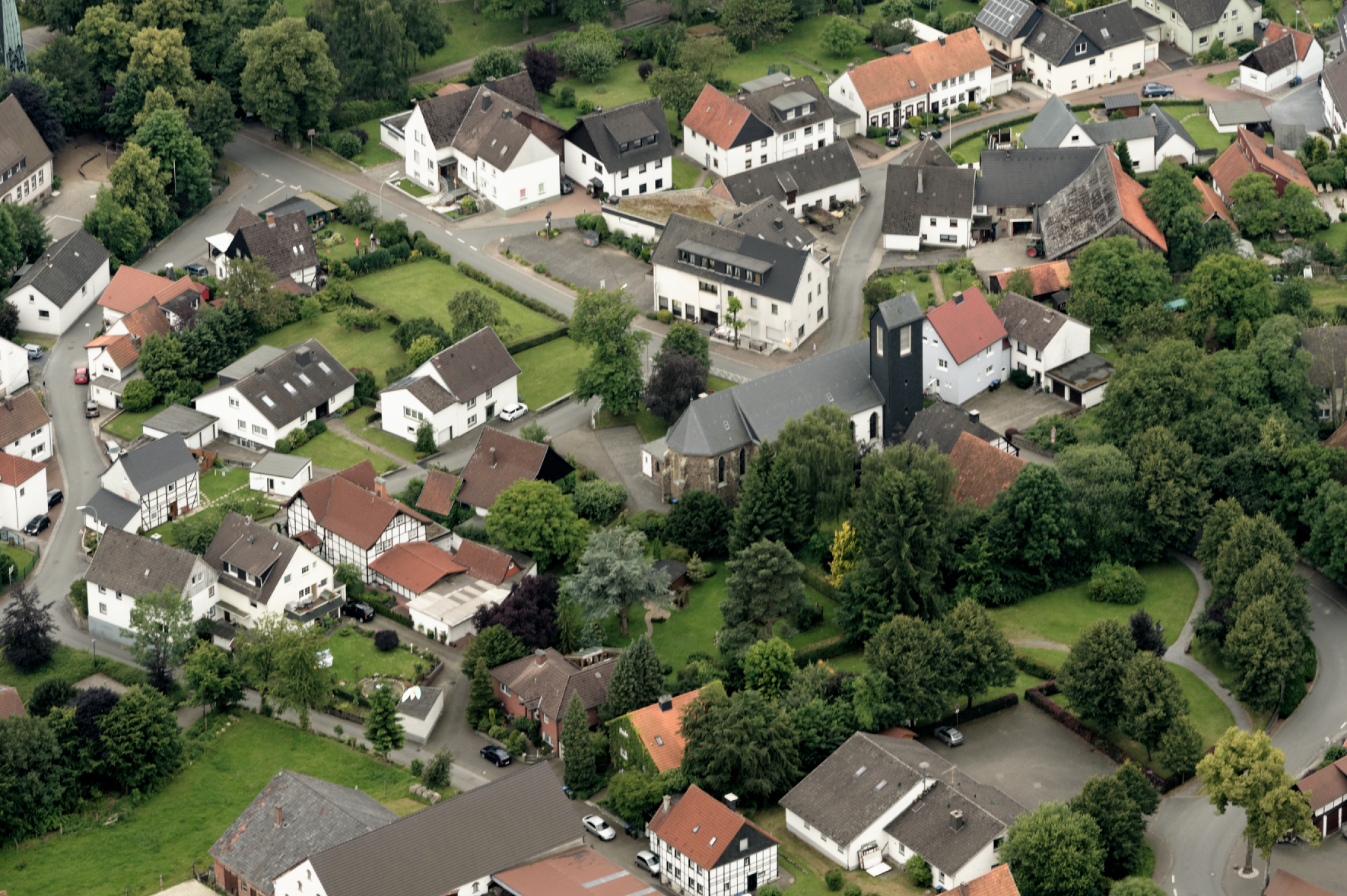 Fotoflug Sauerland-Nord. Möhnesee-Völlinghausen mit katholischer Kirche St. Luzia, Blickrichtung Südwest. The making of this document was supported by the Community-Budget of Wikimedia Germany.